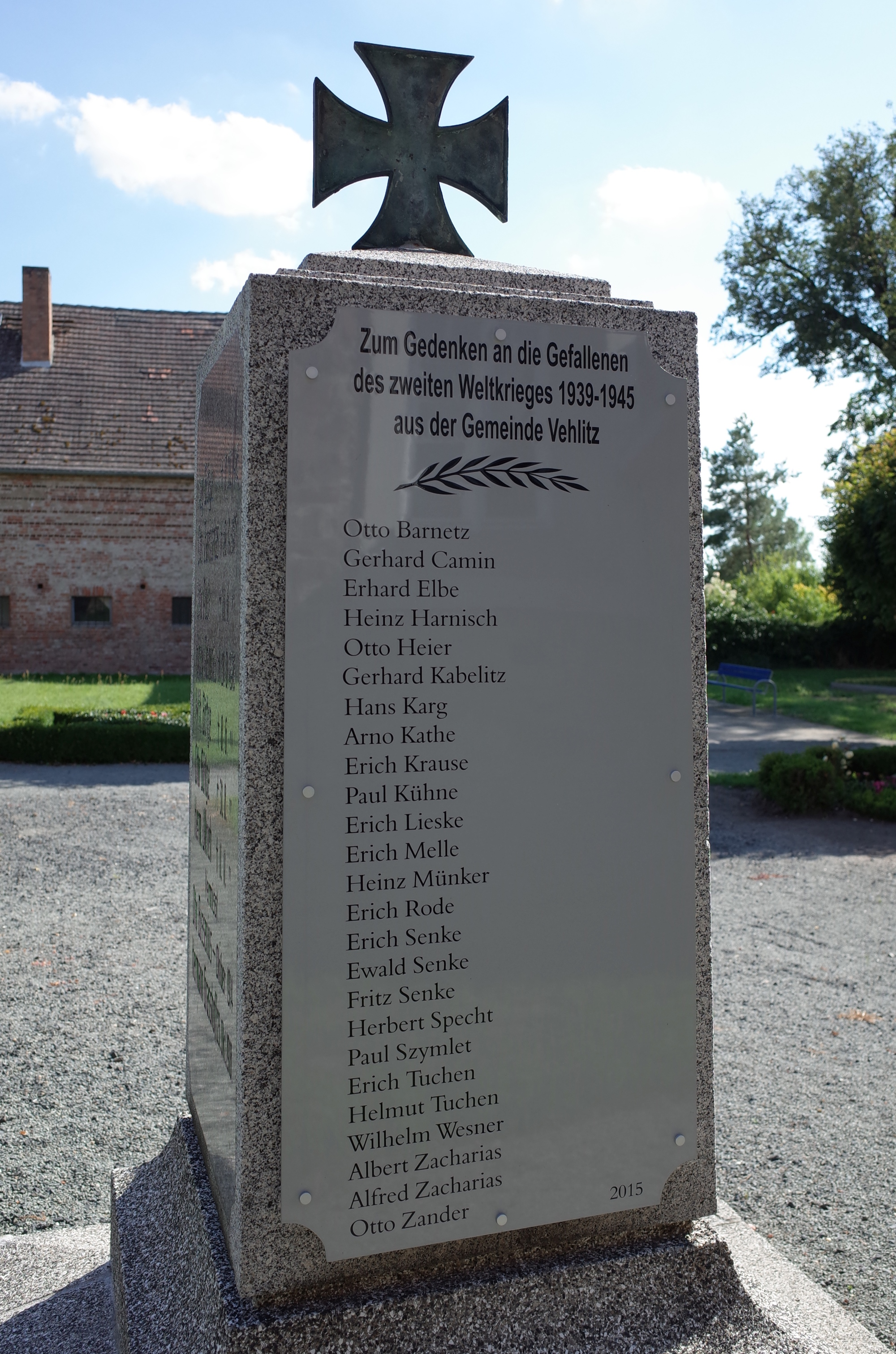 Gommern, Kriegerdenkmal im Ortsteil Vehlitz. (Nordseite, II. Weltkrieg))